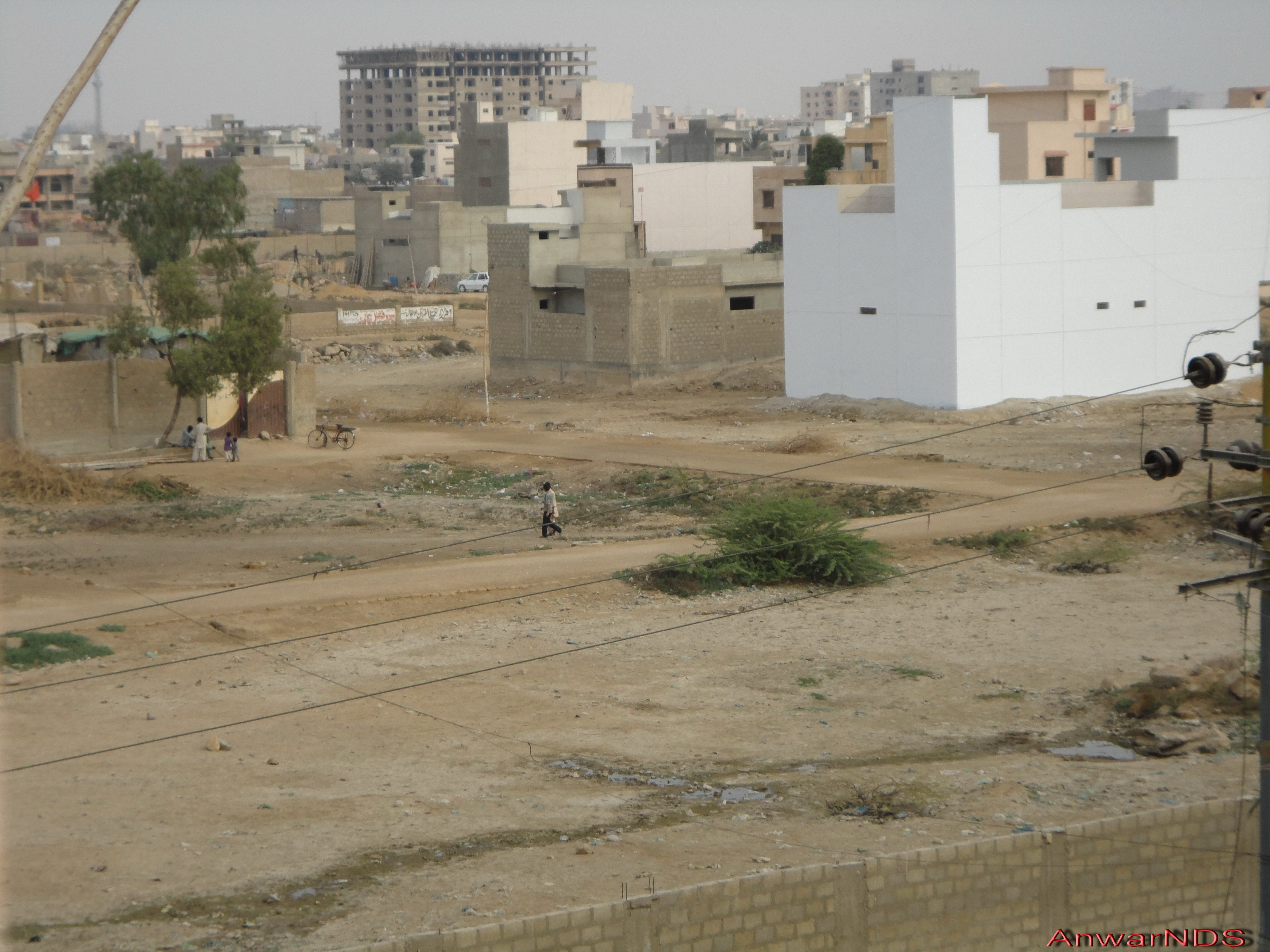 Gulzar-e-Hijari, Karachi